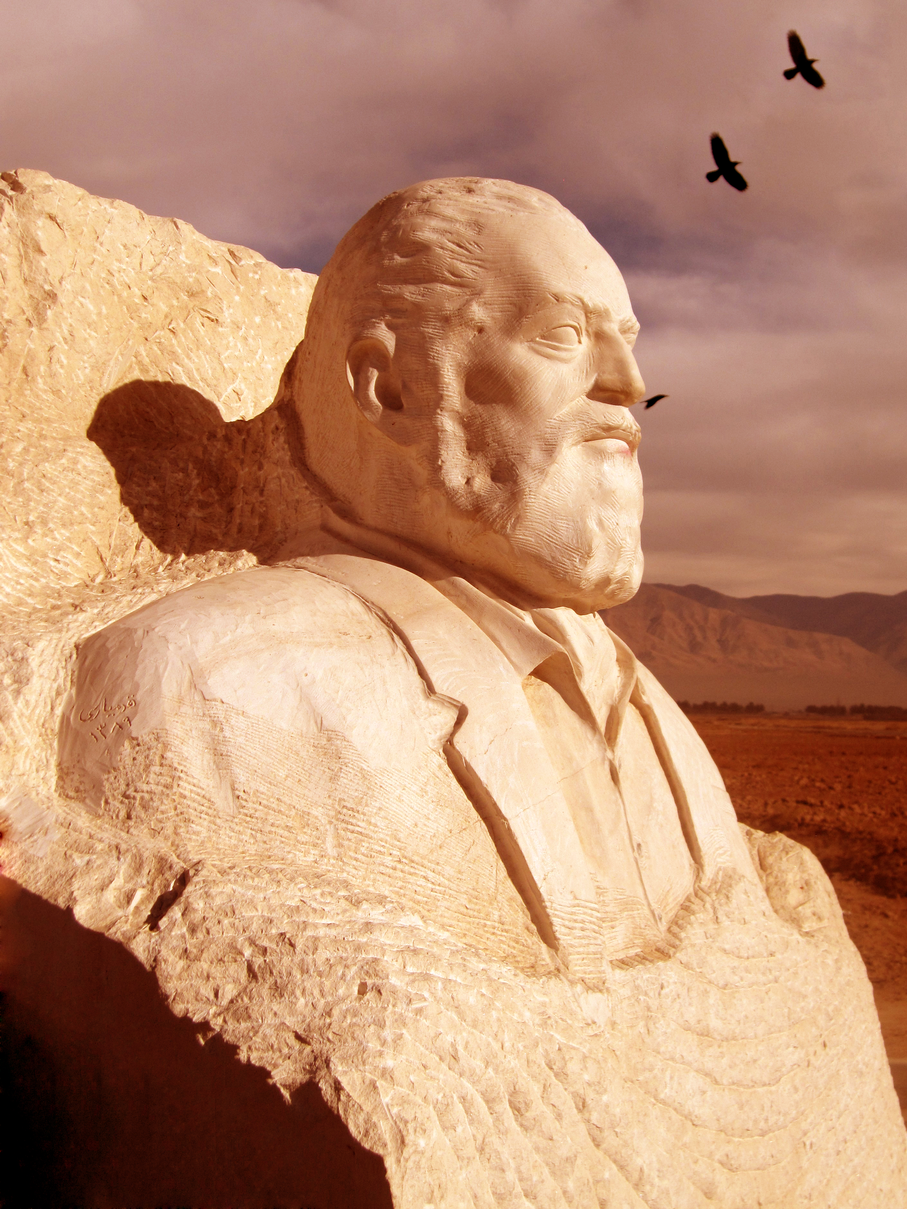 Iran - Neyshabour - Parviz Meshkatian's Statue - بیست و چهارم اردیبهشت زادروز استاد پرویز مشکاتیان